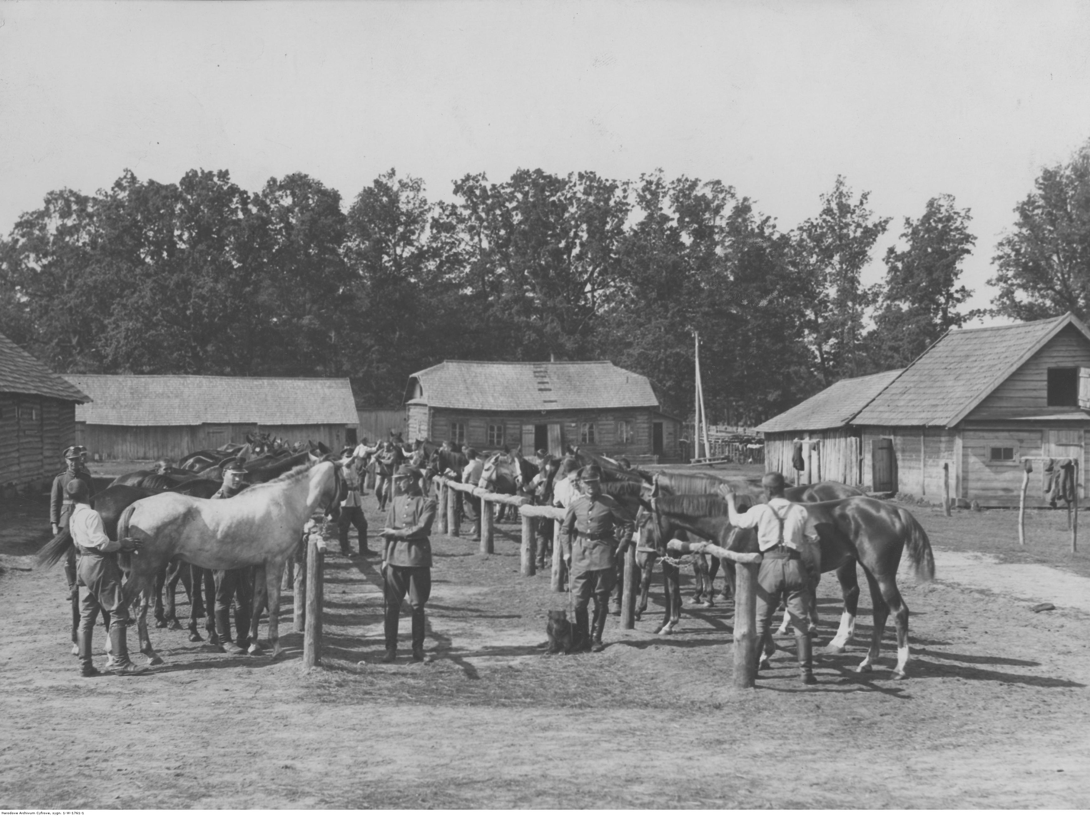 Ranne czyszczenie koni w 16 szwadronie Korpusu Ochrony Pogranicza. Koncern Ilustrowany Kurier Codzienny - Archiwum Ilustracji